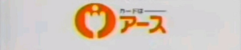 アース時代のロゴマーク